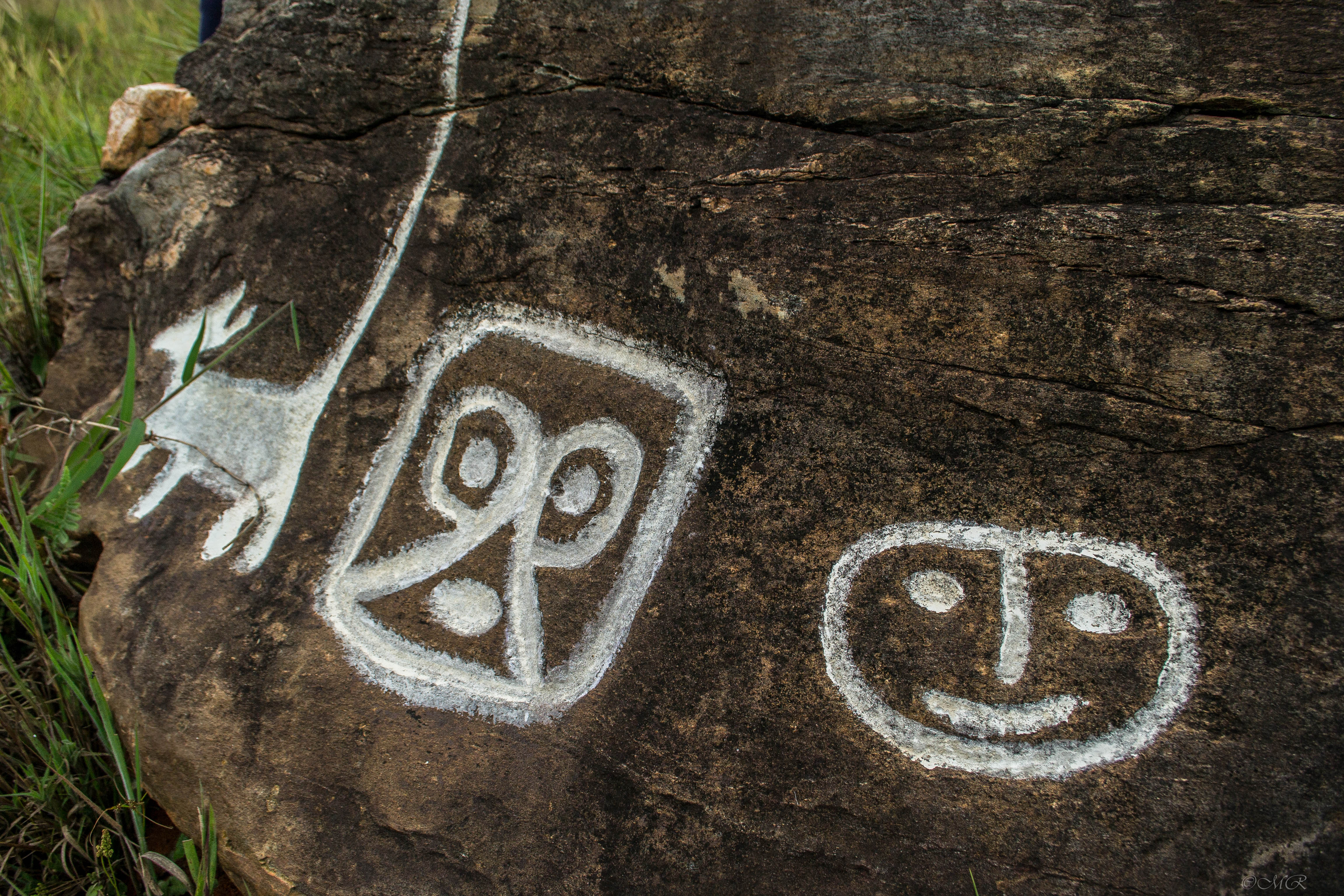 La Cumaca, Complejo De Petroglifos